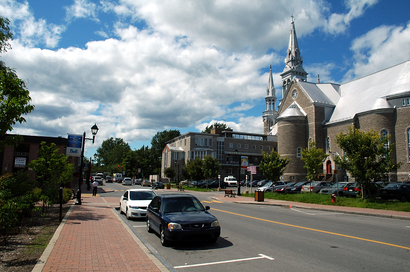 Français cadien: La cathédrale de St-Jérôme et le centre ville.